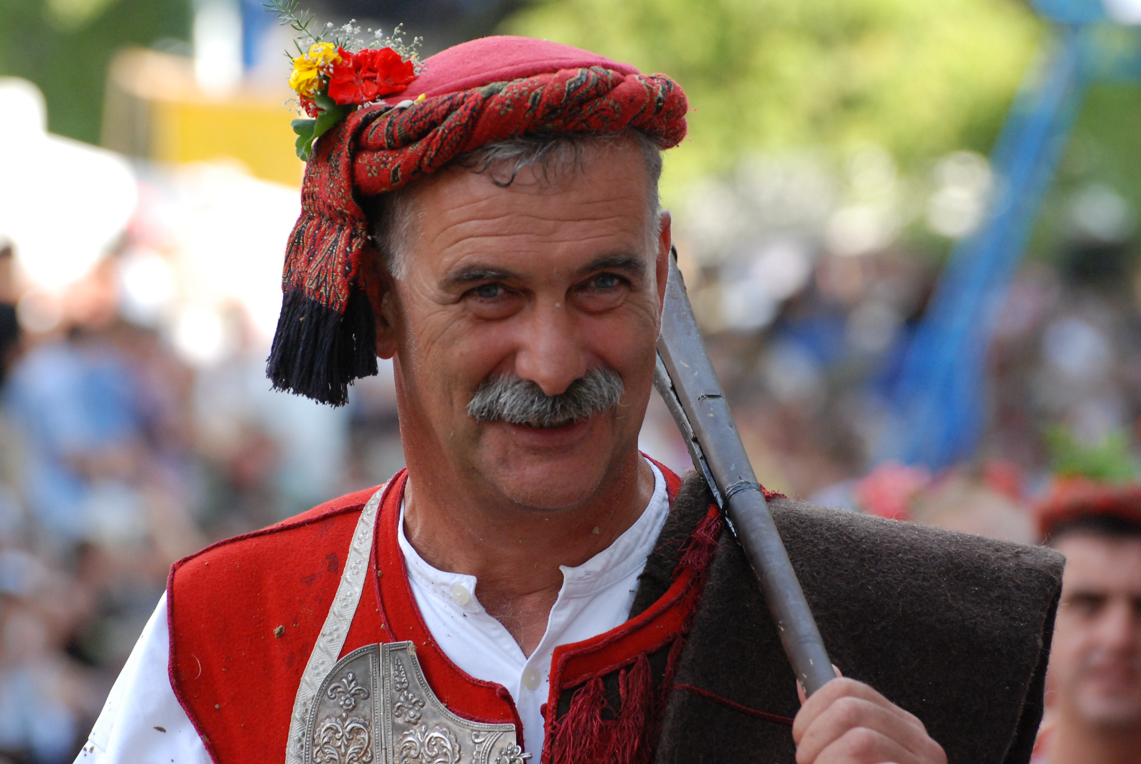 Alkarski momak s puškom kremenjačom na lijevom ramenu, a na glavi zapeškirena crvena kapa urešena kitama.